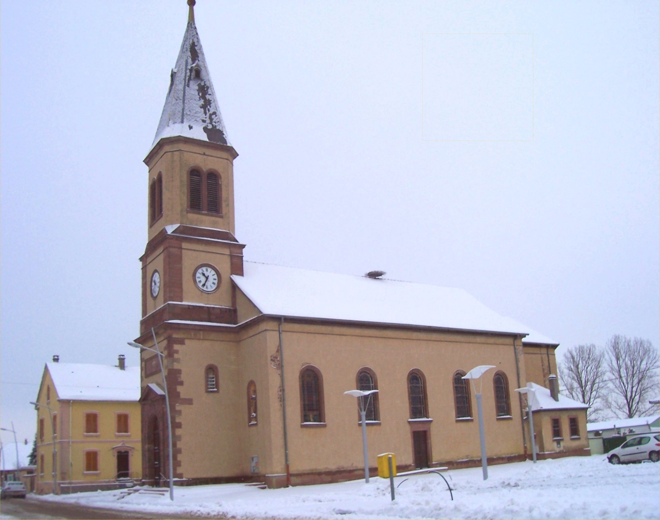 Eglise Saint-Joseph de Bischwihr sous la neige This image was created with . This is a retouched picture, which means that it has been digitally altered from its original version. Modifications: éclaircissement de l'image. The original can be viewed here: Bischwihr neige01.jpg: . Modifications made by Fandecaisses.